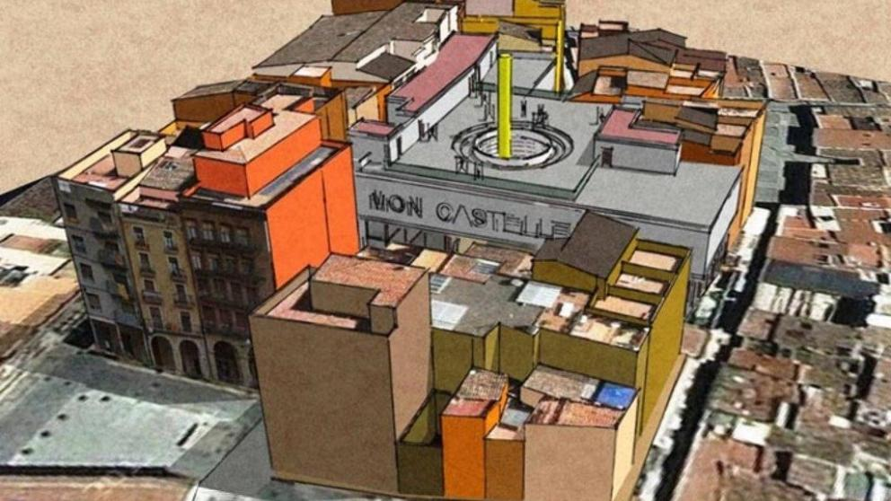 Vista 3d del MCC en el context urbanístic